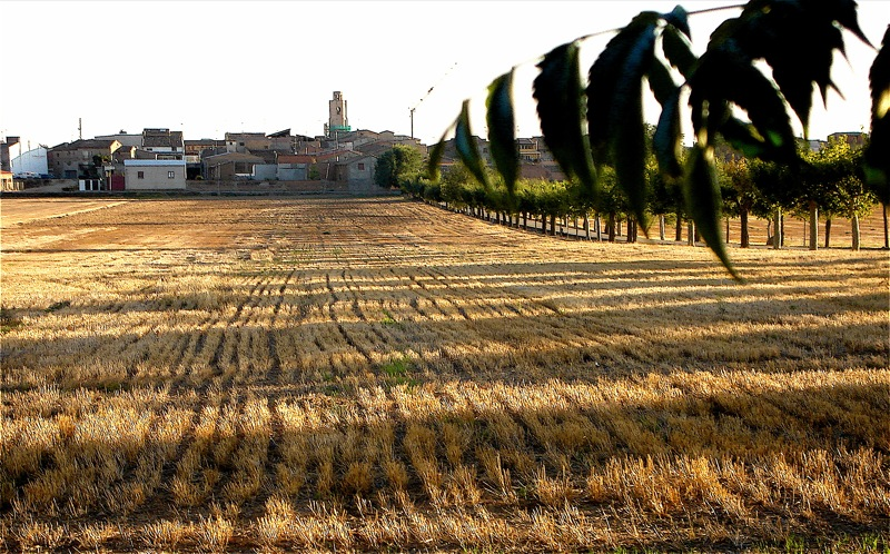 Alcampell, Huesca, Aragón